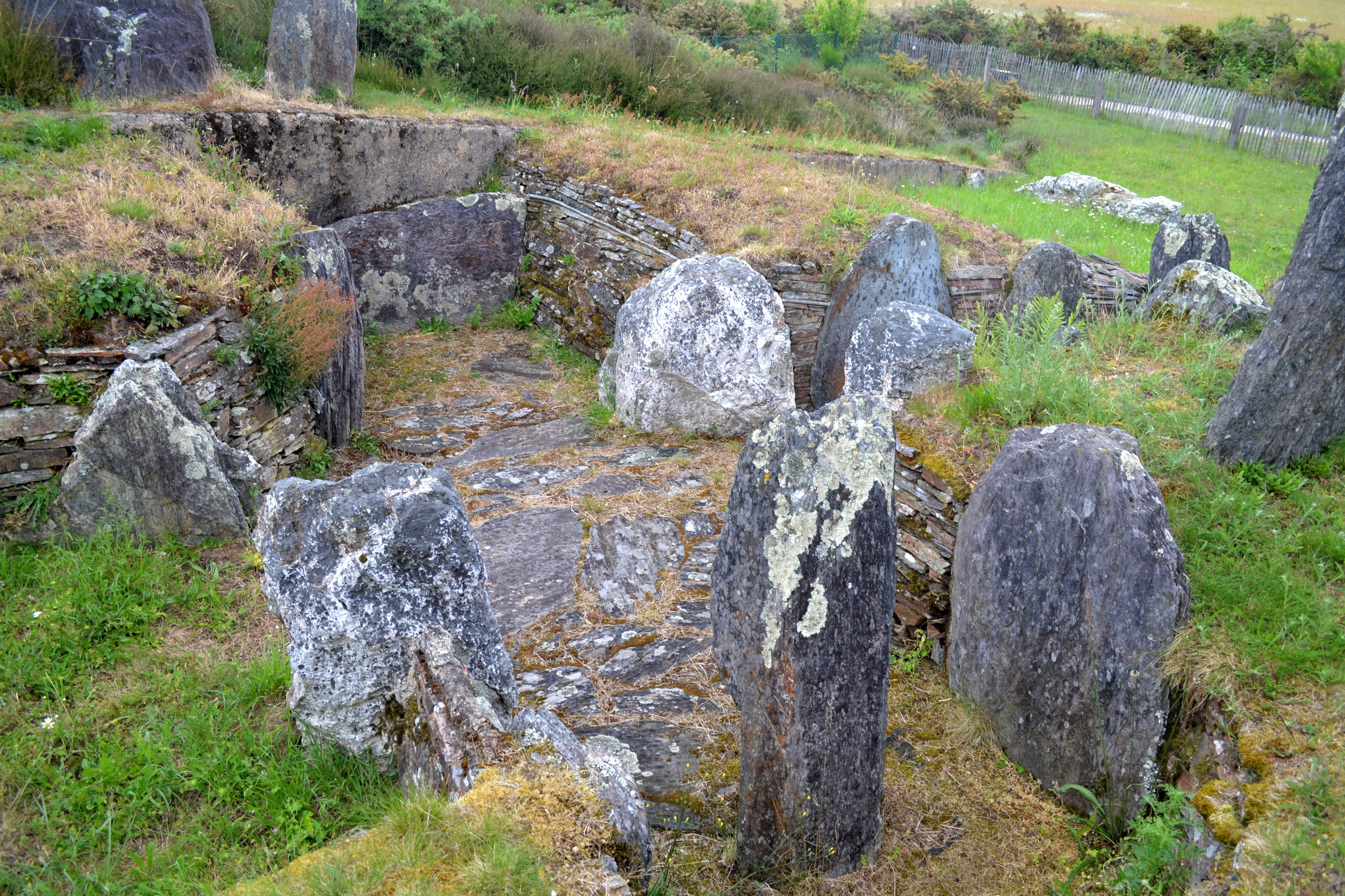 Tumulus de Château Bû, Saint-Just (35).